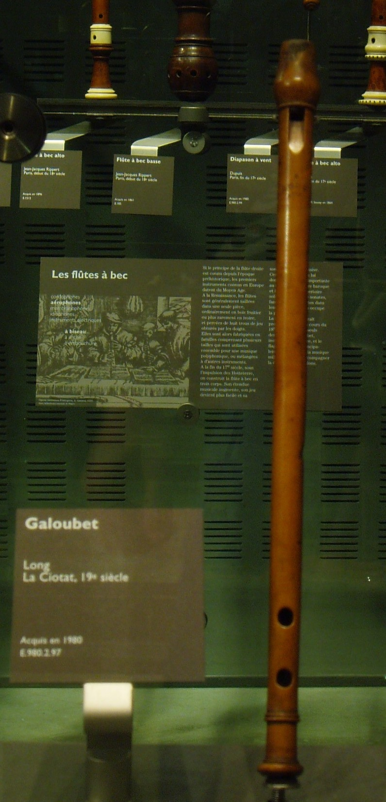 Galoubet long - La Ciotat, XIXth century - Paris, Musée de la musique